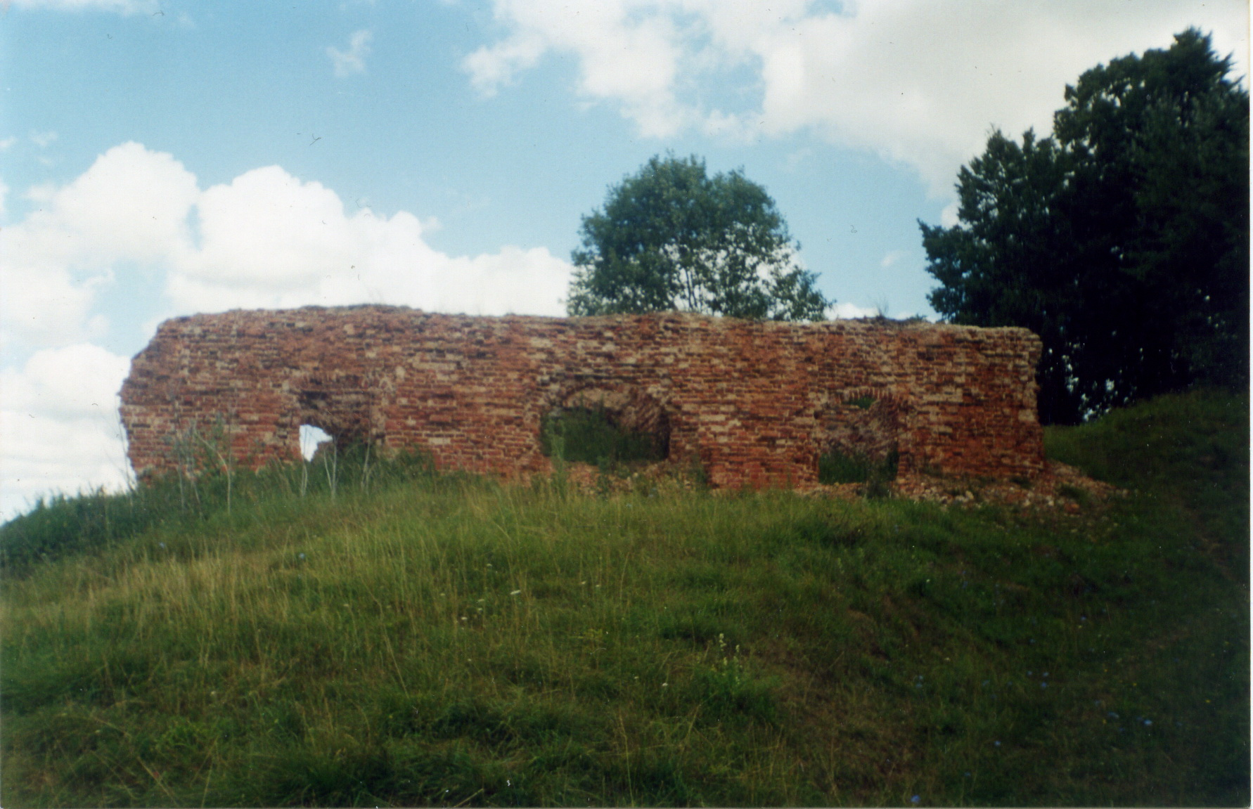 Руіны сядзібы